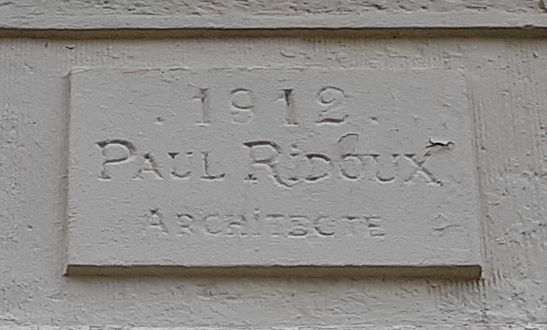 Plaque Architecte Paul Ridoux Touquet-Paris-Plage.